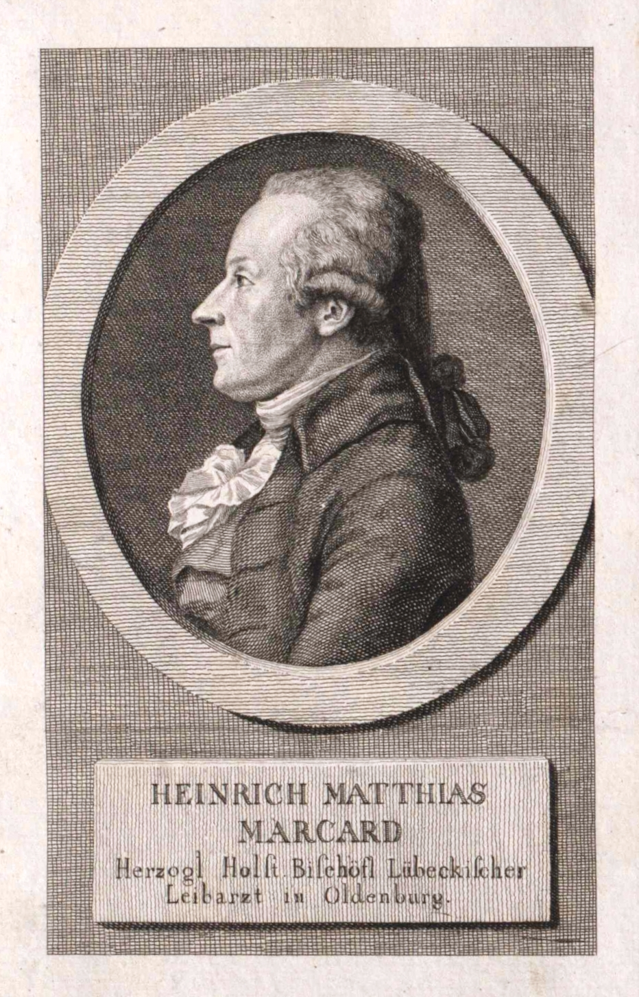 Bildnis des Heinrich Matthias Marcard (1747-1817)